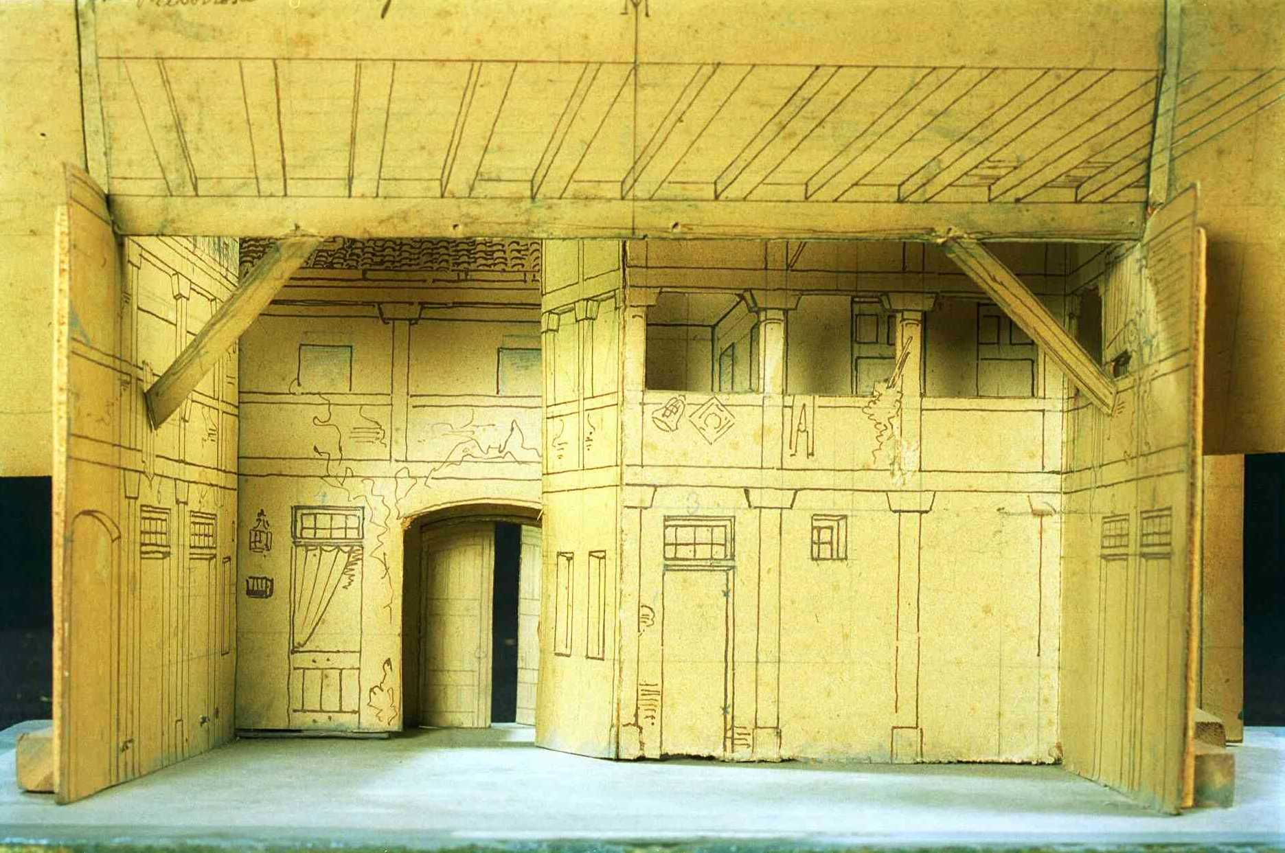 Teatrí per a la sarsuela de La revoltosa de Chapí i Fernández-Shaw